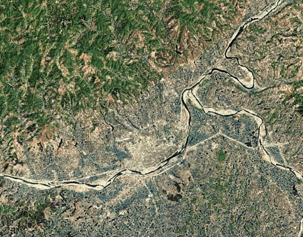 汉中市西乡县卫星图